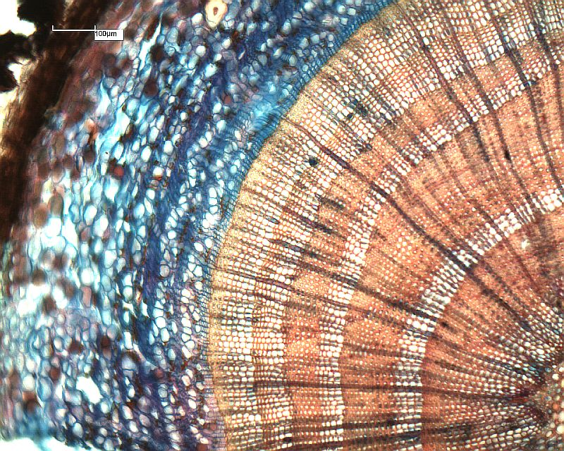 Zweig einer Lärche im Querschnitt, eingefärbt mit Etzold-Lösung, um die einzelnen Strukturen unterscheidbar darzustellen. Rot: Verholzte Zellwände, Blau: Unverholzte Zellwände, Purpurrot: Sclerenchym